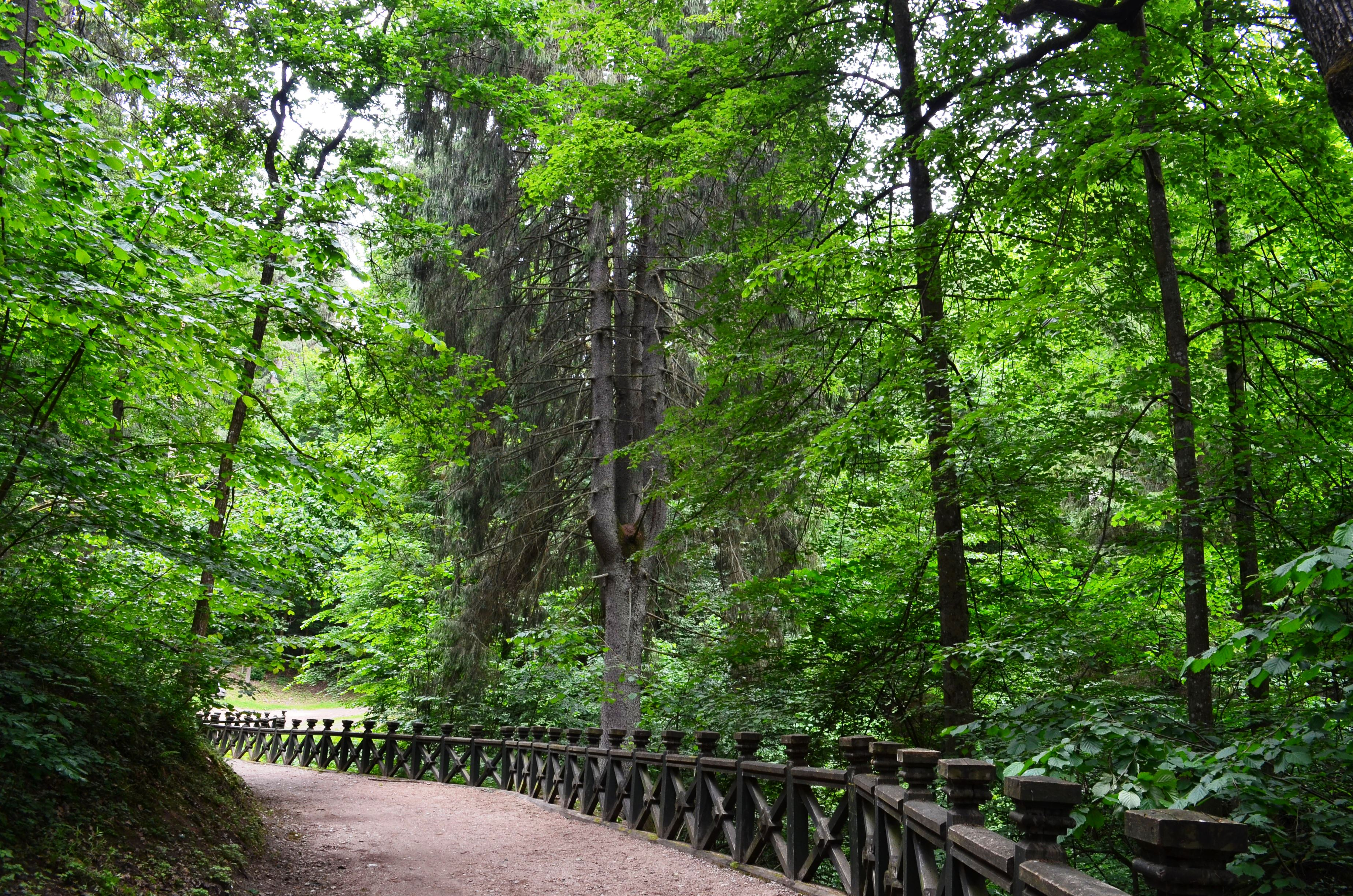 Daugiakamienė eglė, Verkių RP, Vilnius